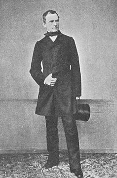 Титов, Владимир Павлович. Русский посланник в Константинополе.